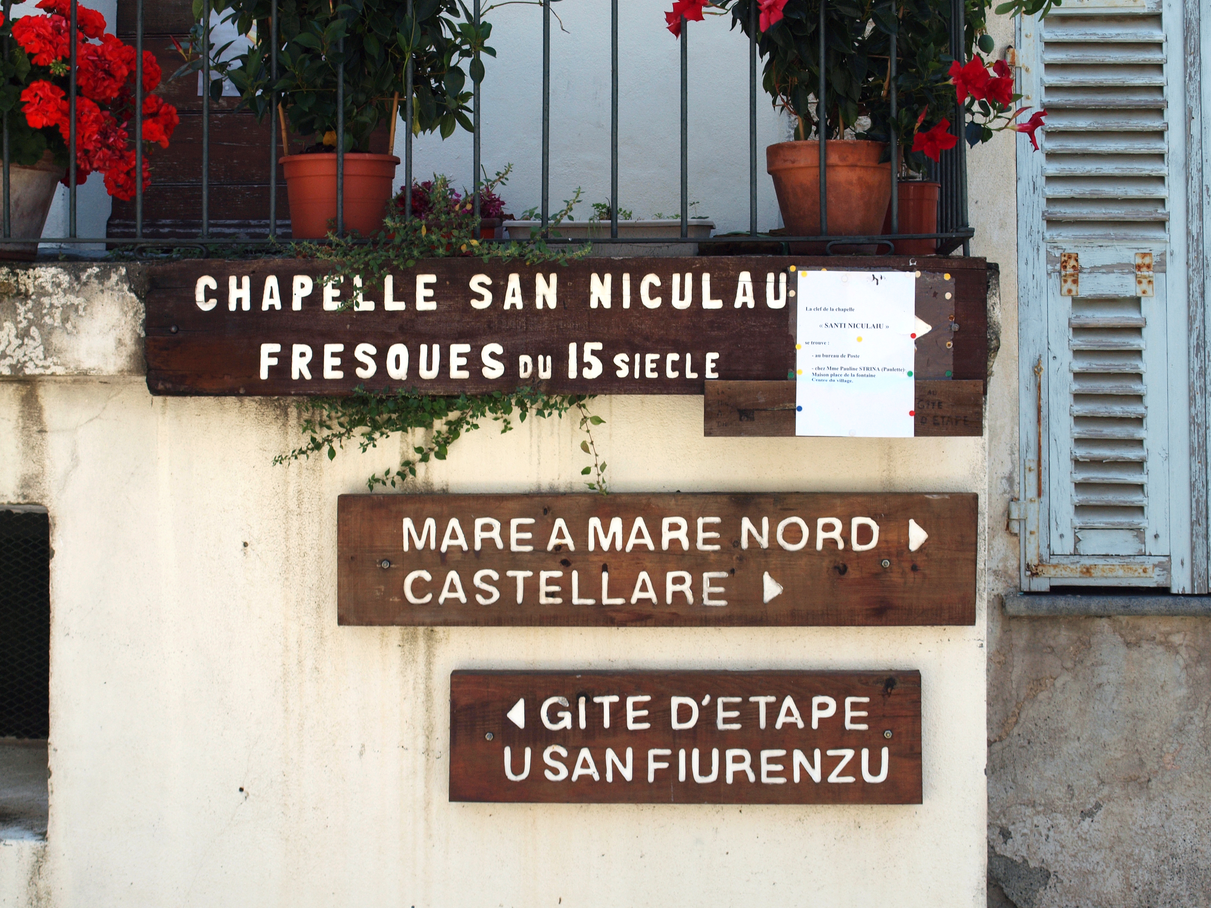 Sermano (Corse) - Fléchages directionnels à Sermano (sentier de GR, gîte d'étape, monument historique)